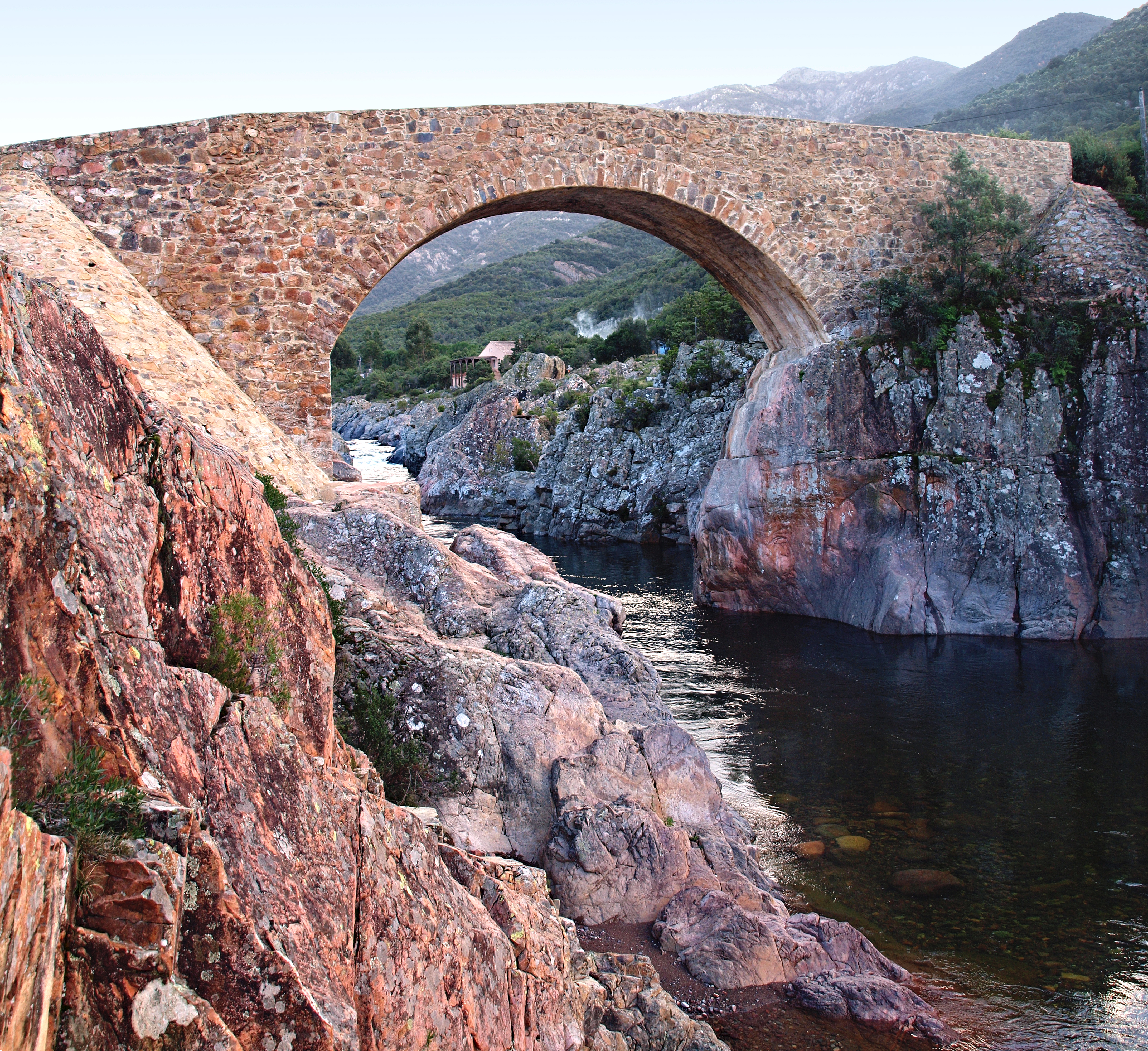 Galéria (Haute-Corse) - Pont génois dit Ponte Vecchiu sur le Fango